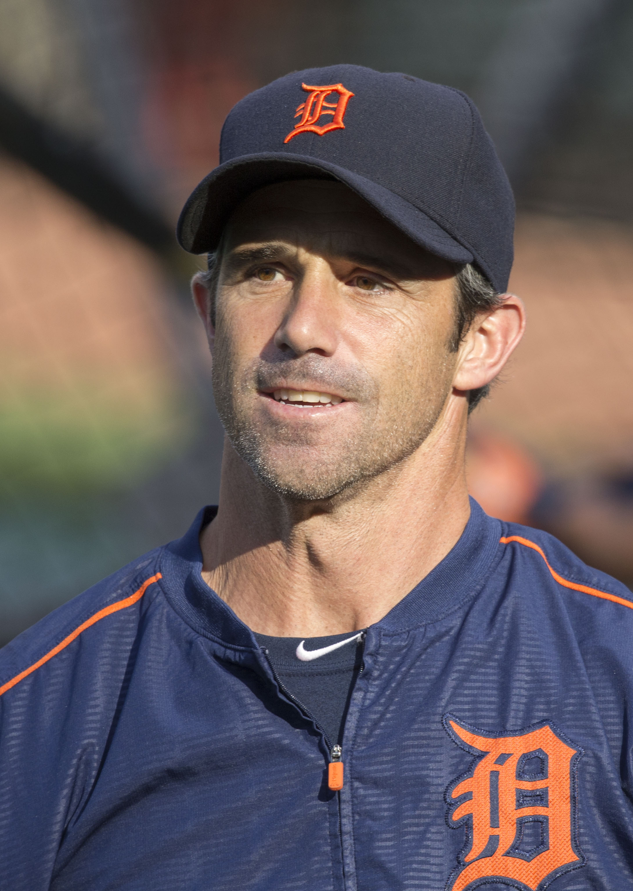 Brad Ausmus